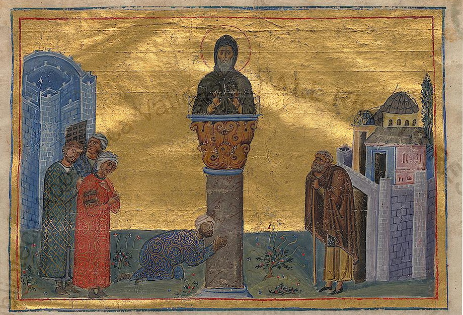 Прп. Симеон Столпник. Миниатюра из Минология Василия II. Мастер Пантолеон (Fol. 2)